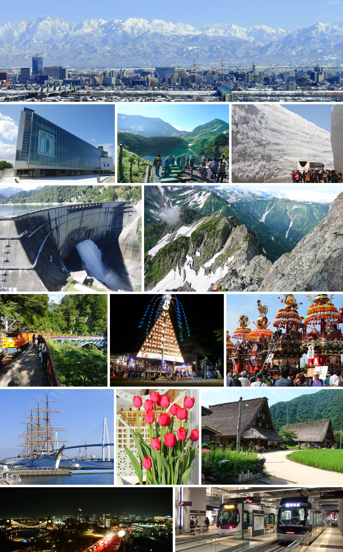 富山県モンタージュ